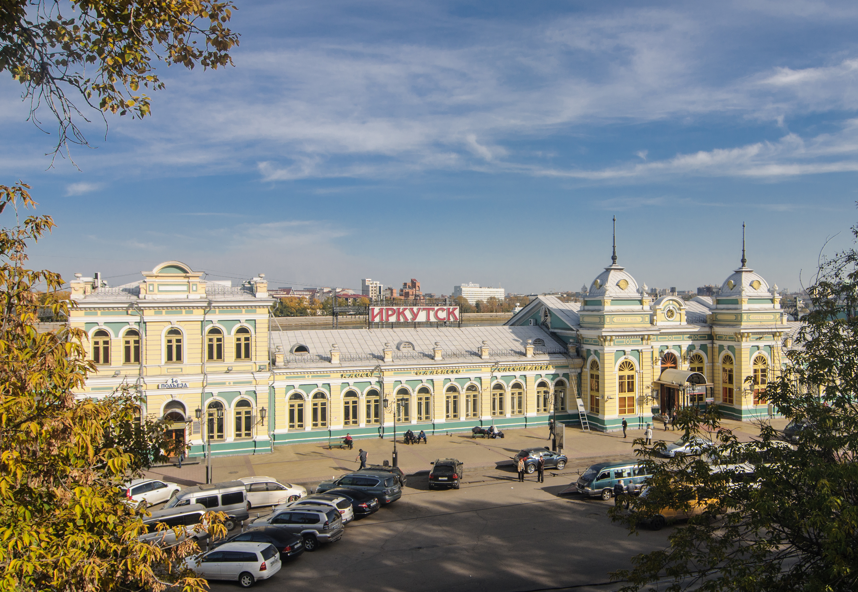 Комплекс железнодорожного вокзала: улица Вокзальная, ж/д ст.иркутск-пассажирский, Иркутск, Иркутская область